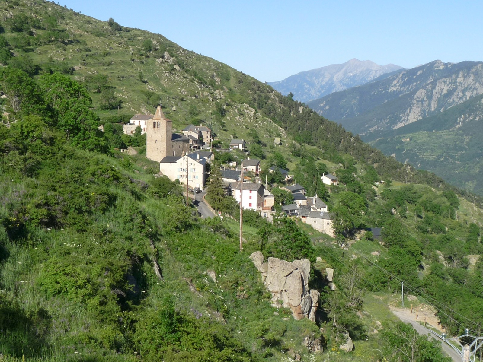 Sauto, Pyrénées-Orientales, France